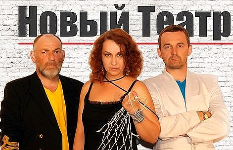 Новый театр